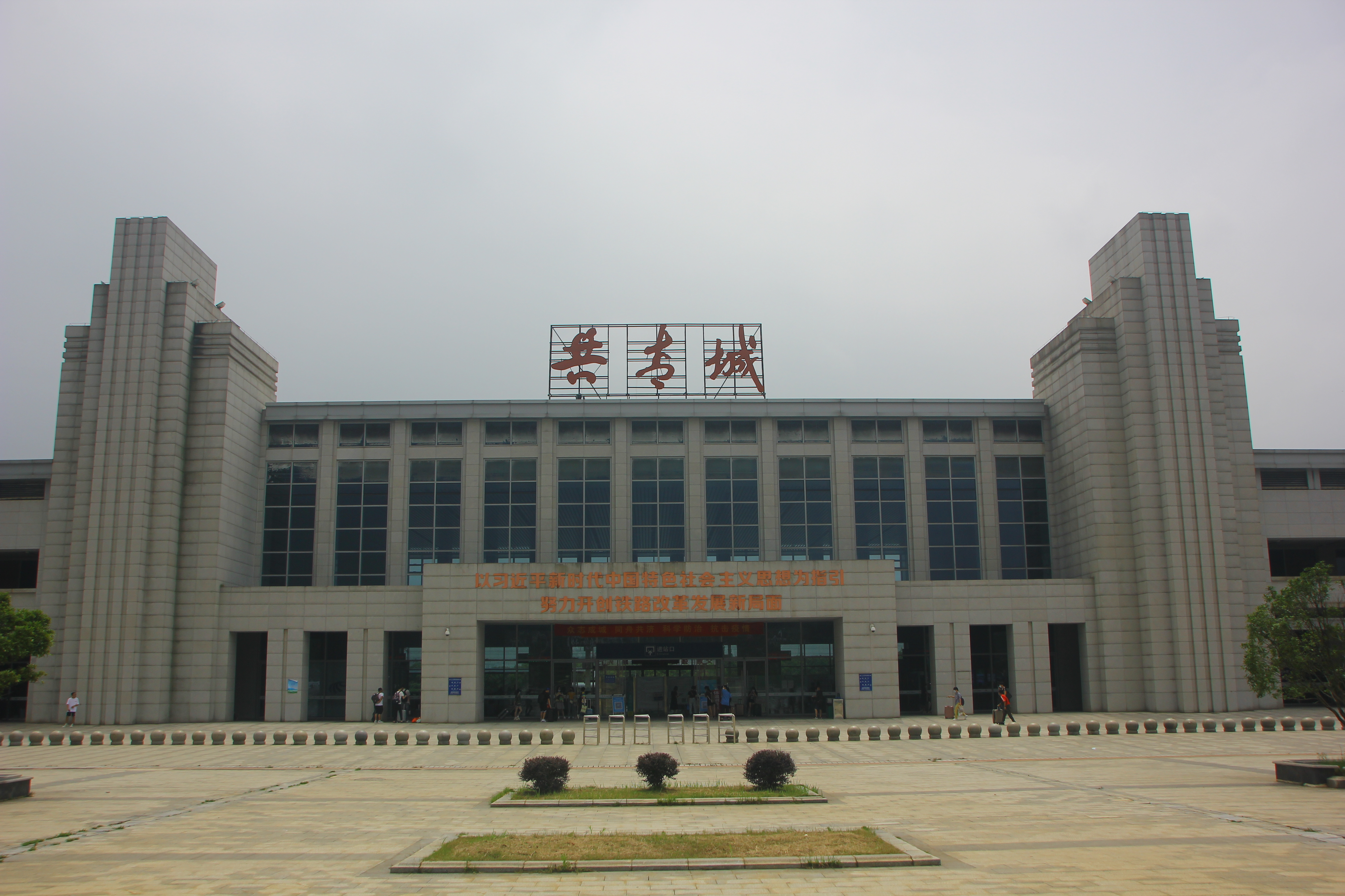 中文（中国大陆）: 共青城站站房